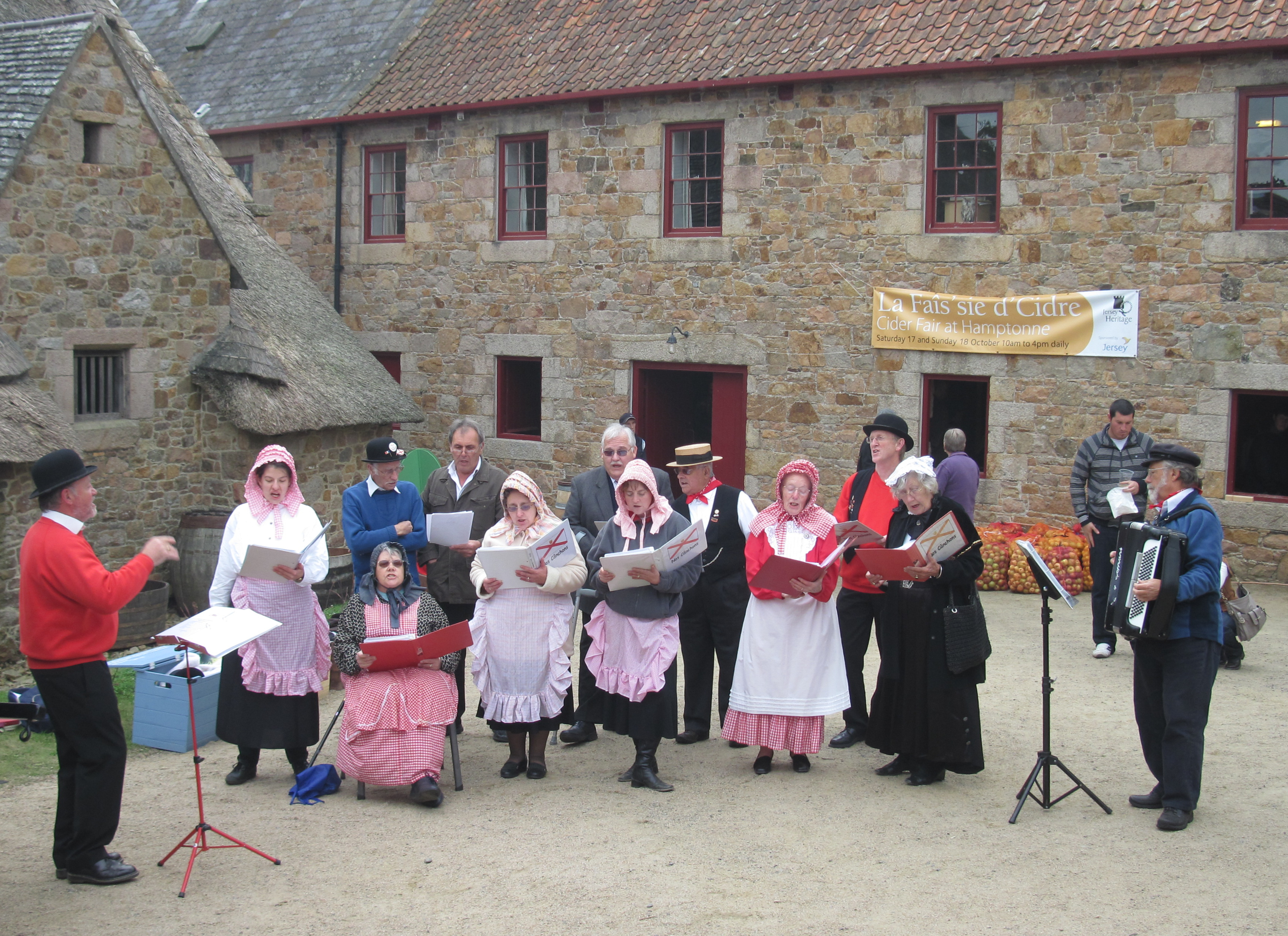 Nrf: Faîs'sie d'Cidre, 17-18 d'Octobre 2009, Jèrri